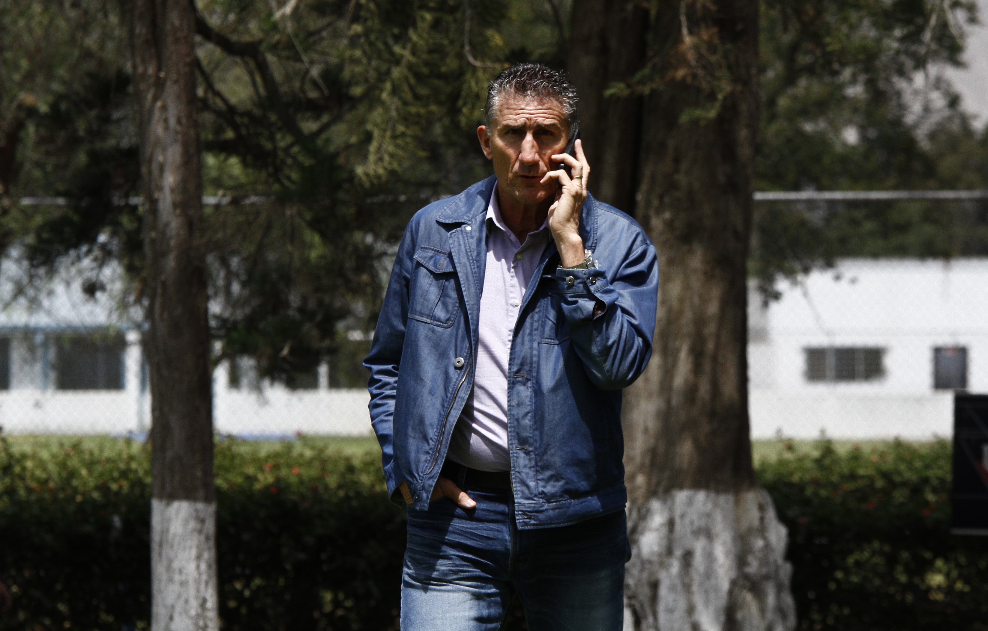 Quito, Ecuador, 07 ene (ANDES).- Edgardo Bauza, Técnico del San Lorenzo visitó al equipo ecuatoriano LDU de Quito. Foto: Micaela Ayala V./ANDES